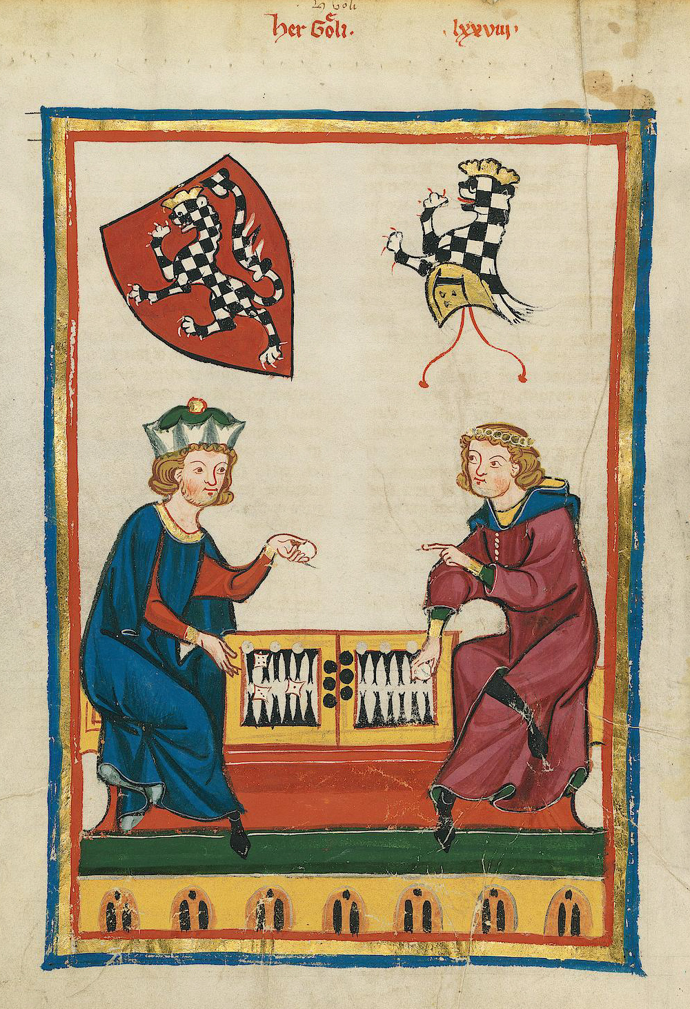 Codex Manesse, UB Heidelberg, Cod. Pal. germ. 848, fol. 262v: Herr Goeli